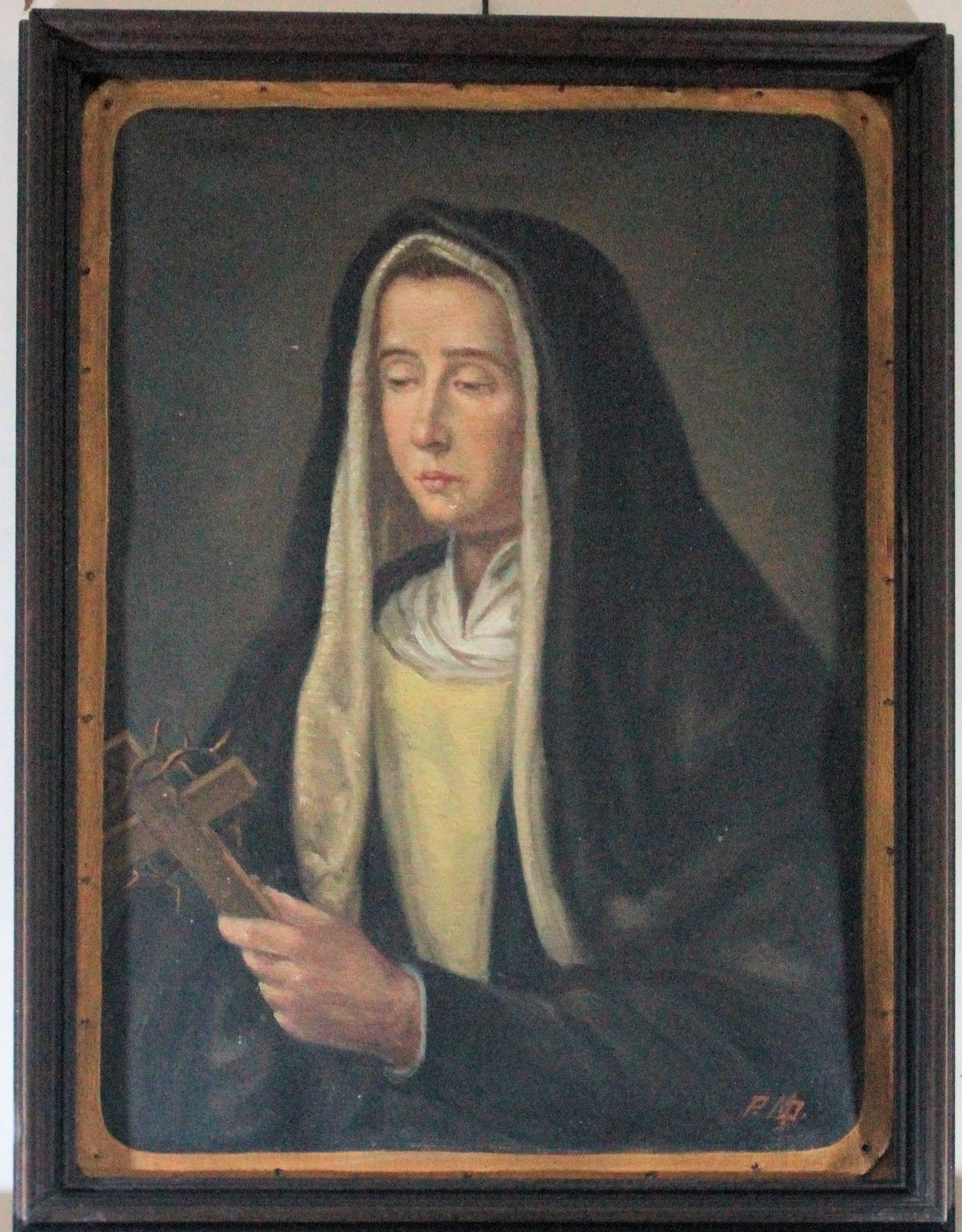 Raffigurazione della Serva di Dio Claudia De Angelis